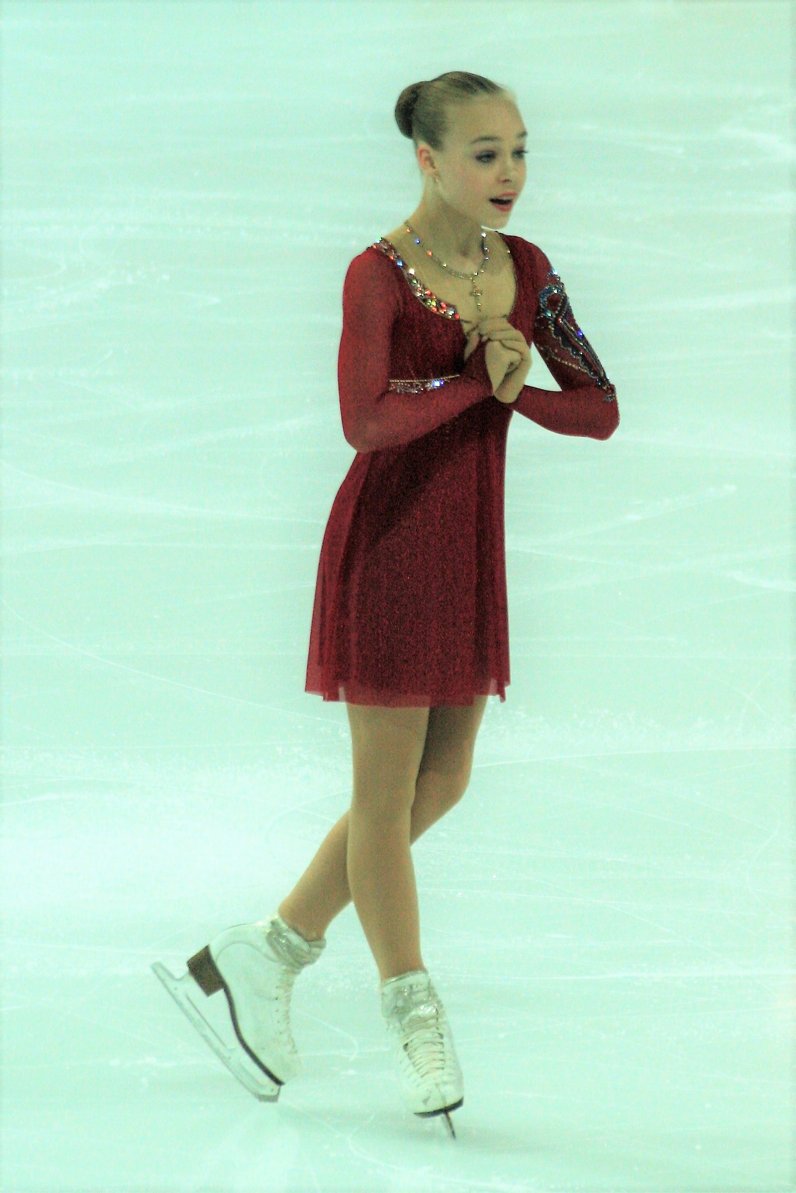 Анастасия Губанова (Россия) на финале Гран-при по фигурному катанию среди юниоров 2016-2017